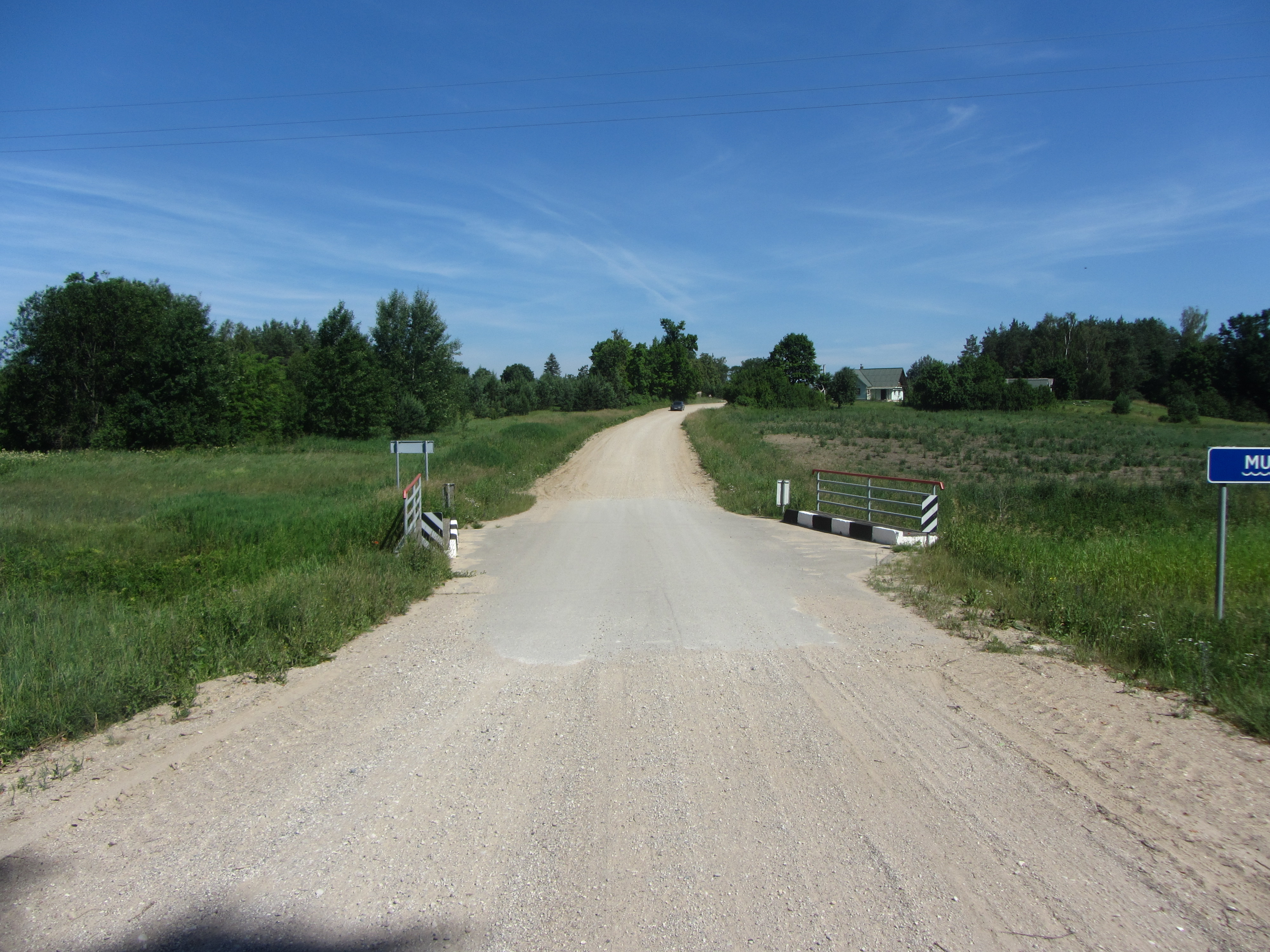 Varėnos sen., Lithuania